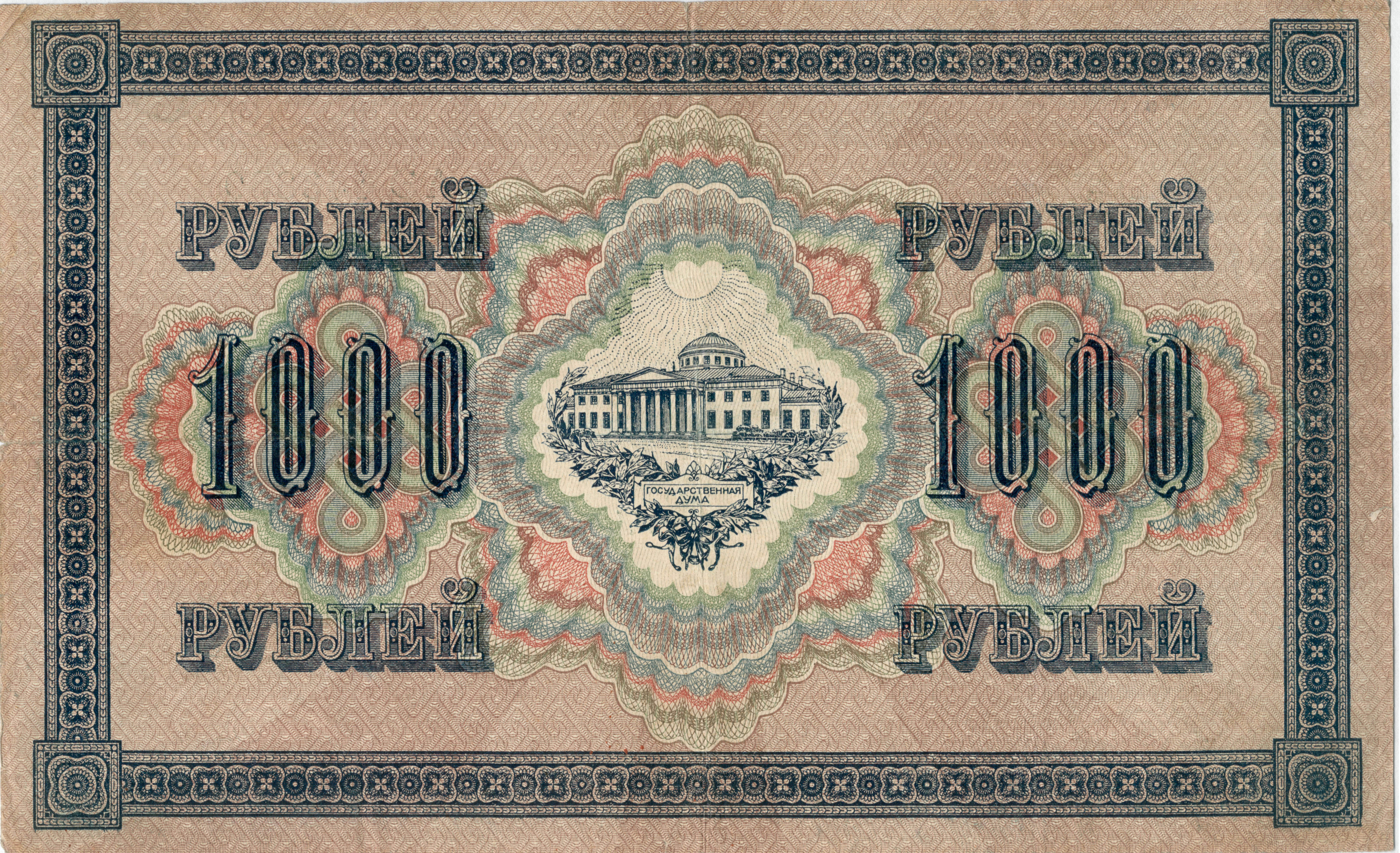 1000 рублей (т.н. "думка" с изображением Таврического дворца в СПб, где заседала Государственная Дума) Временного правительства 1917 года. Реверс